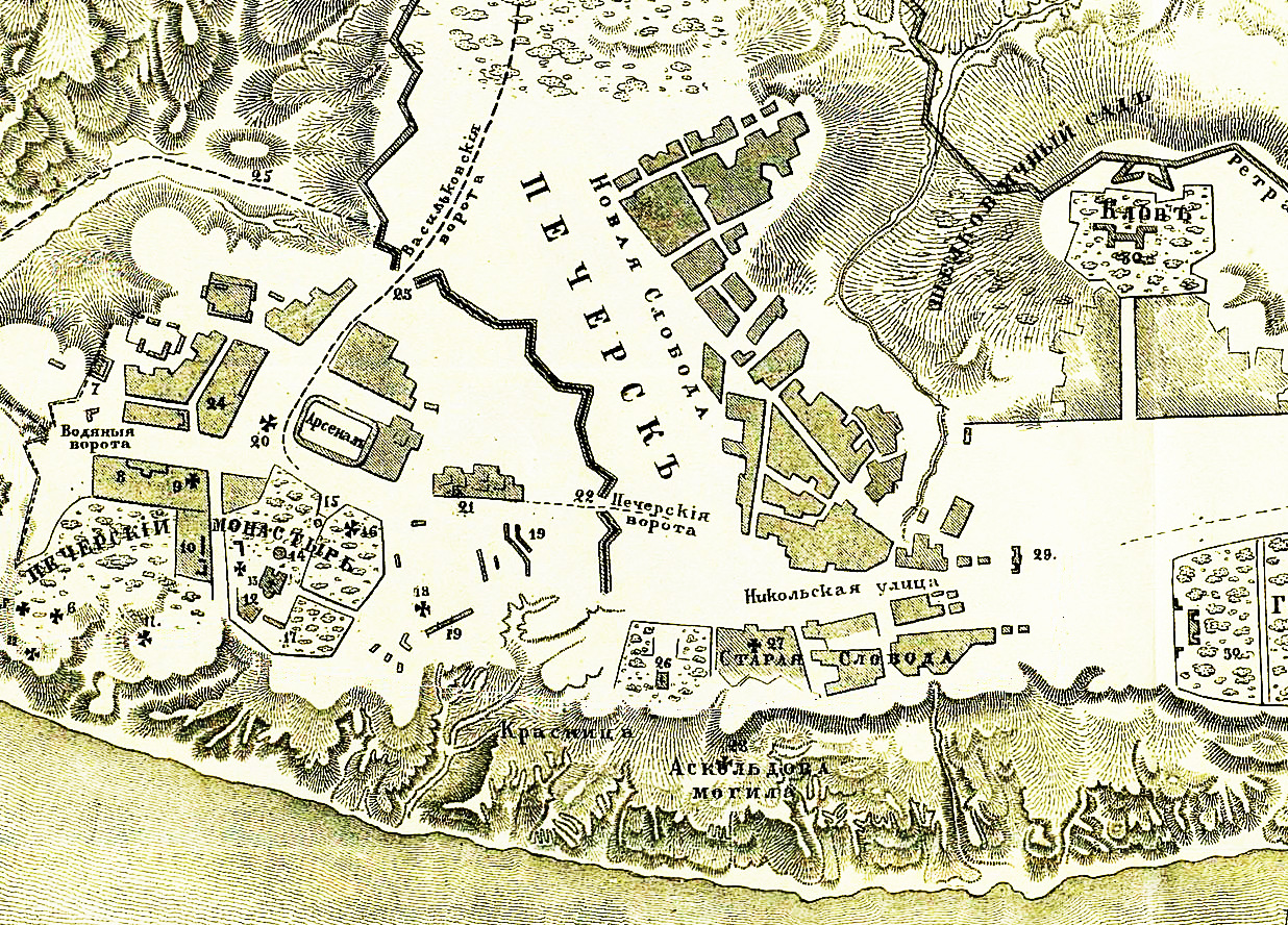 Печерськ, Хрести (Нова Слобода), Клов. Фрагмент плану Києва 1800 року.